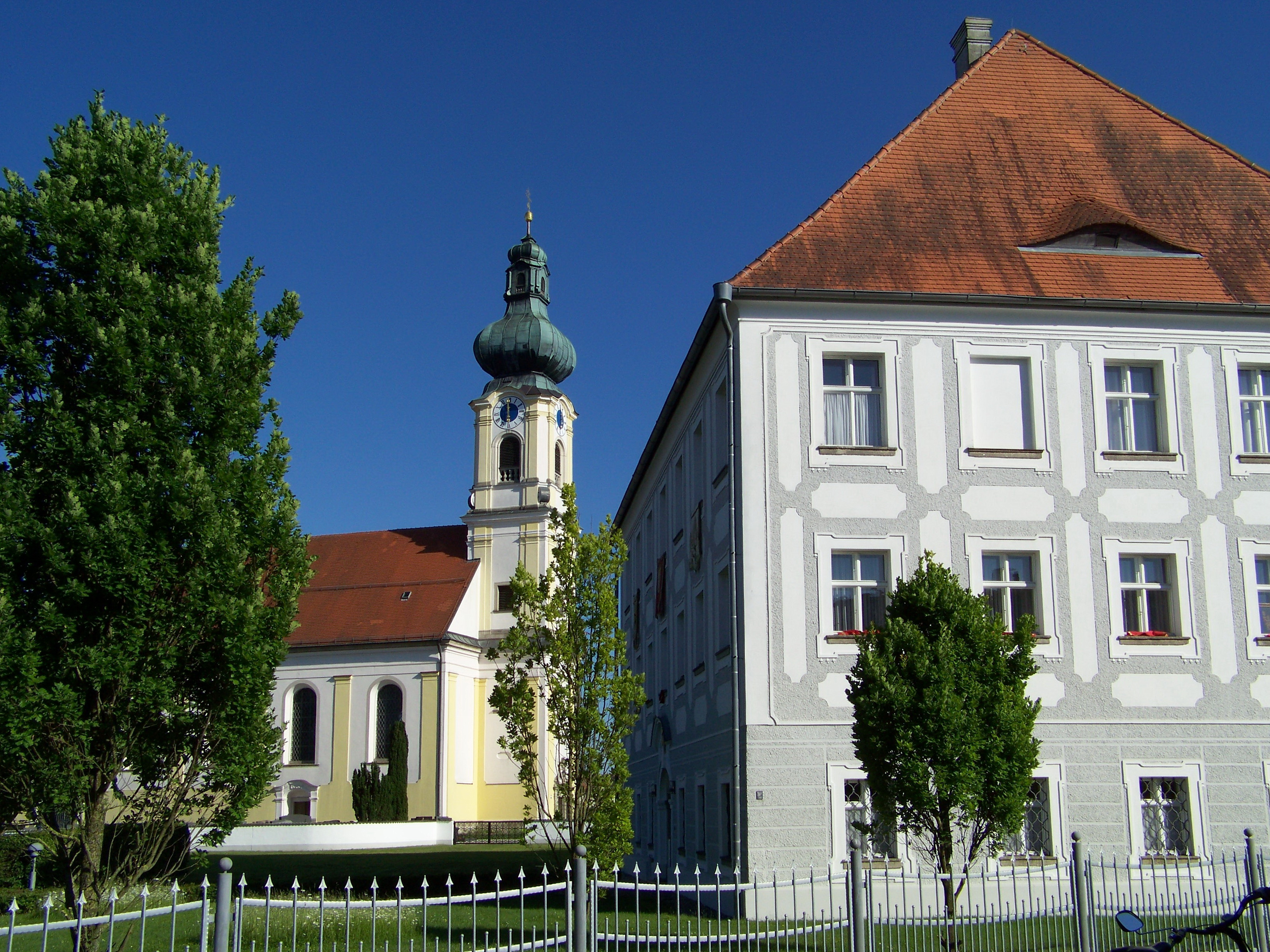 Michaelsbuch, Gamelbertstraße 18. Pfarrhaus. Dreigeschossiger stattlicher Walmdachbau mit reicher barocker Fassadengliederung, 1795.